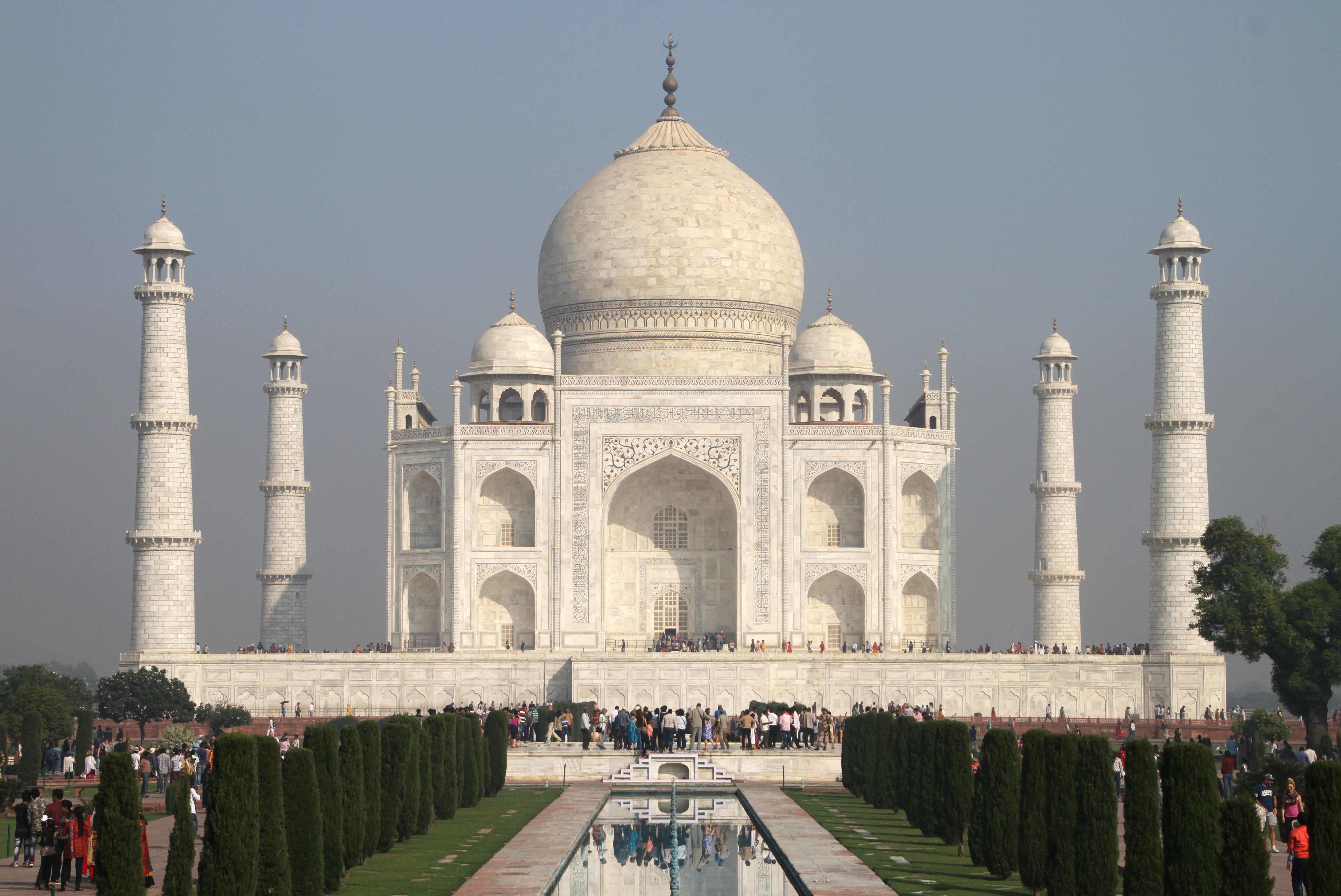 Taj Mahal in Agra